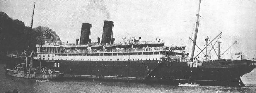 Umrüstung der CAP TRAFALGAR durch SMS EBER